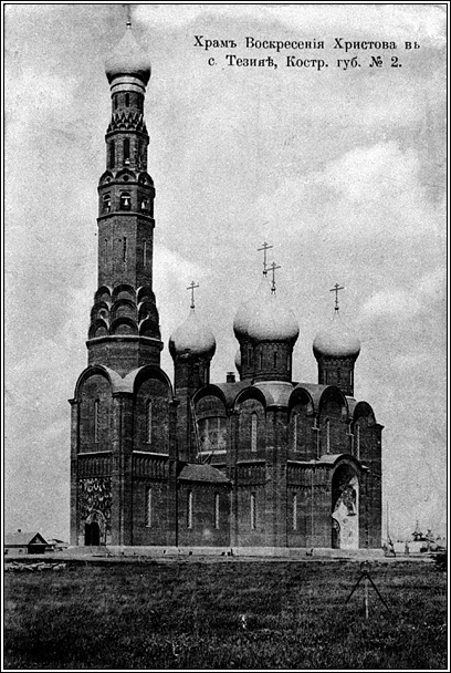 Красная церковь в Тезино